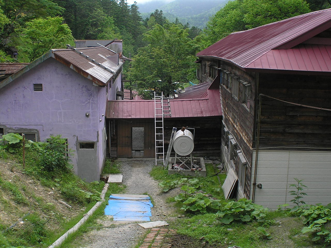 菅野温泉（かんのおんせん）浴場棟（左）と旧館